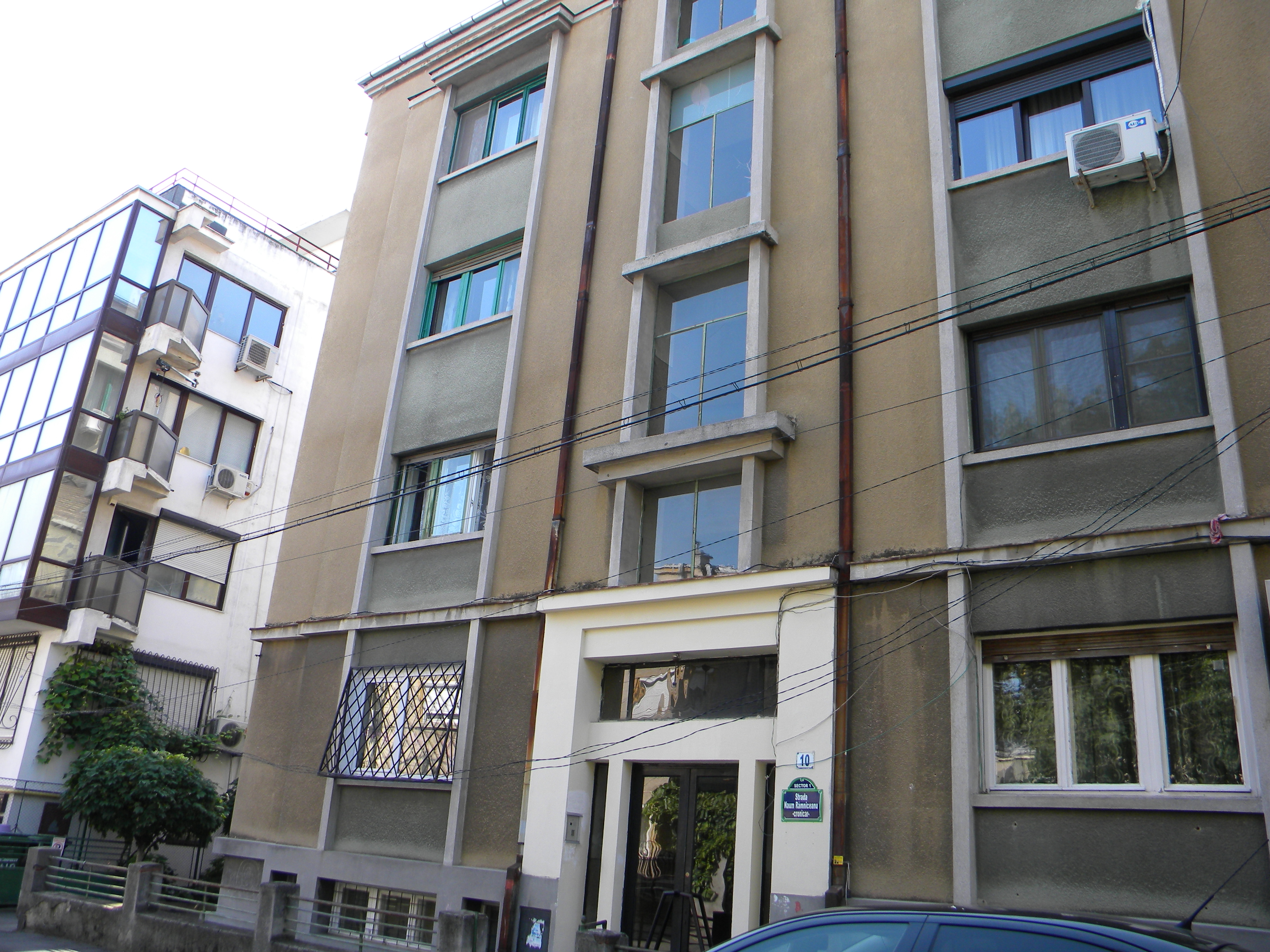 Bucuresti, Romania, Imobil pe Str. Naum Ramniceanu nr. 10; B-II-m-B-19529